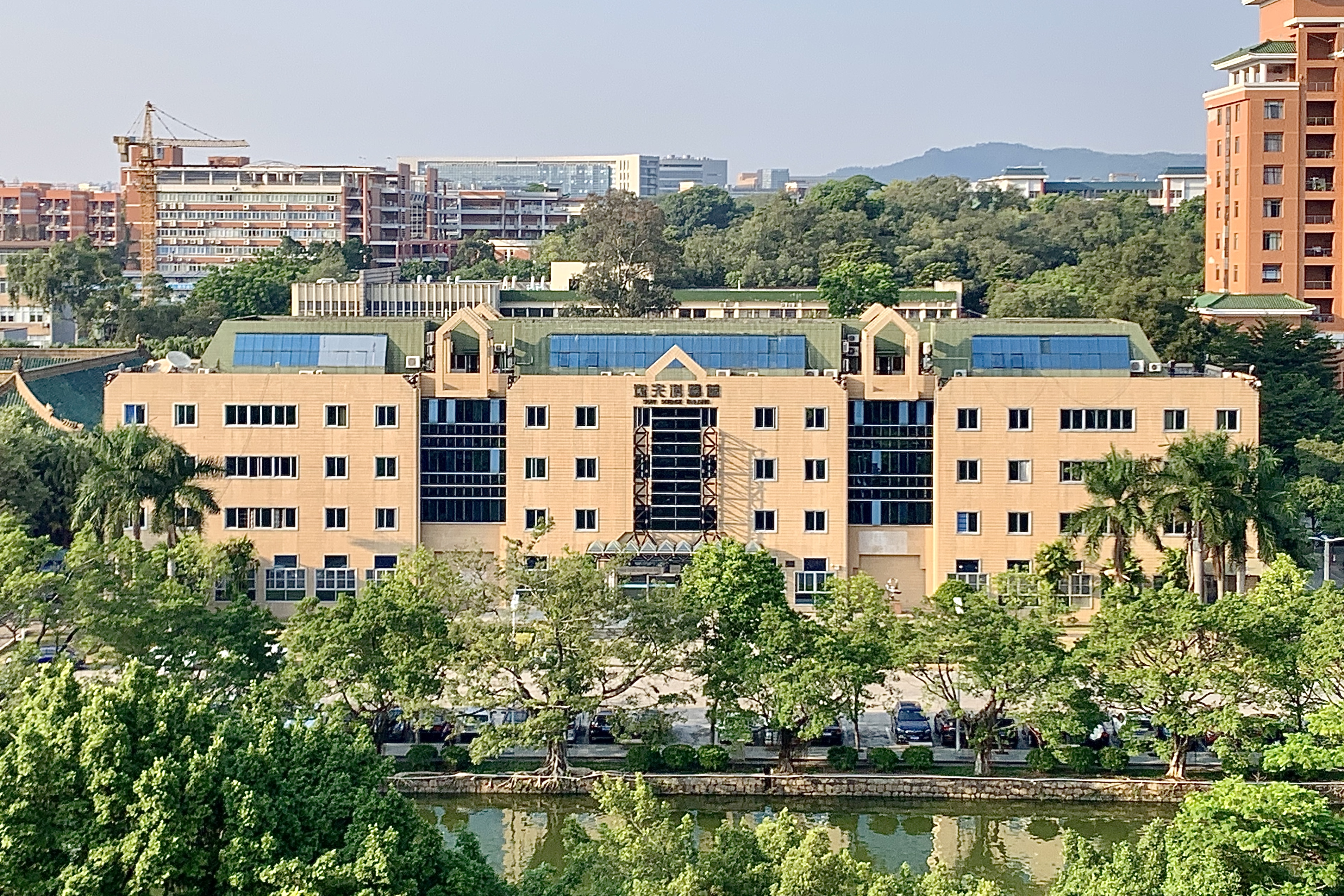 华南理工大学五山校区逸夫科学馆